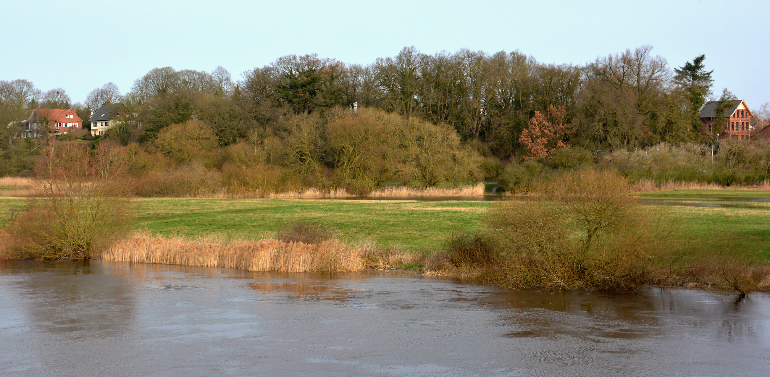 Alte Burg Verden, Ansicht von der Aller